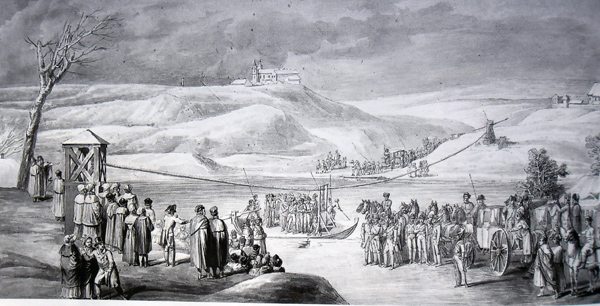 Беларуская (тарашкевіца): Горадня (Horadnia), прыезд караля і вялікага князя Станіслава Аўгуста Панятоўскага (Stanisłaŭ Aŭgust Paniatoŭski) у места